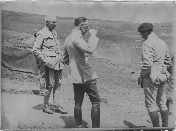 reportage photographique de l'armée française.